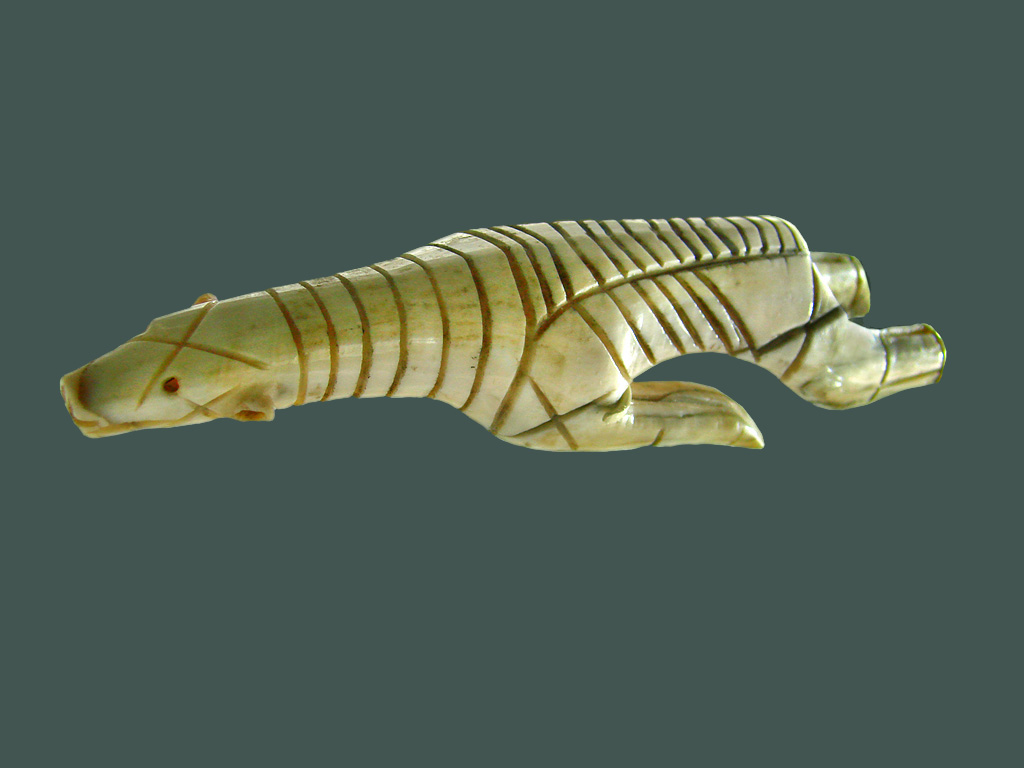 Ours nageant Culture du Dorset moyen Site d'Alamek, région d'Iglulik, Canada Ivoire sculpté Canadian museum of civilization, Gatineau dans l'exposition Upside down, Les Arctiques Musée du Quai Branly